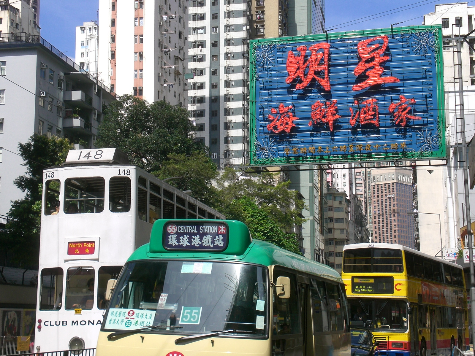 中文（香港）: 盛夏的西營盤公共交通往中環環球大廈